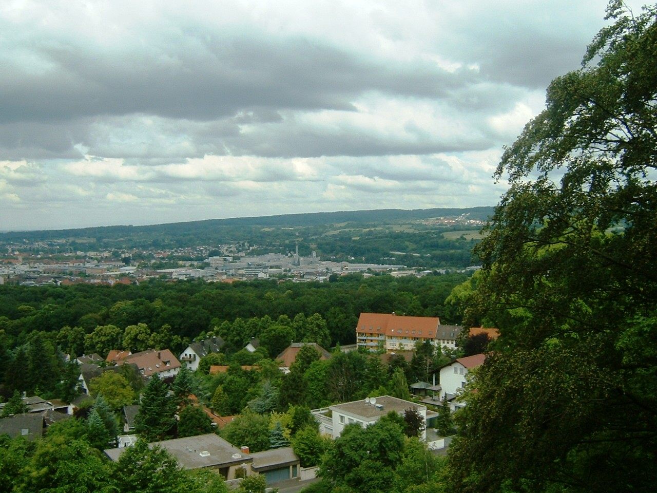 Aschaffenburg vom Godelsberg (Teufelskanzel) aus gesehen